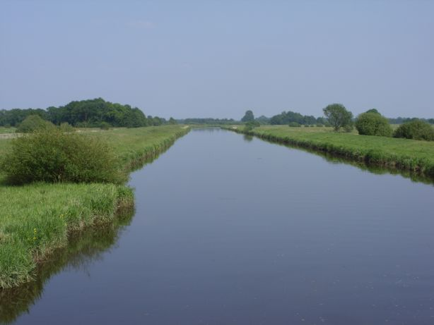 Aper Tief (bei Holtgast)